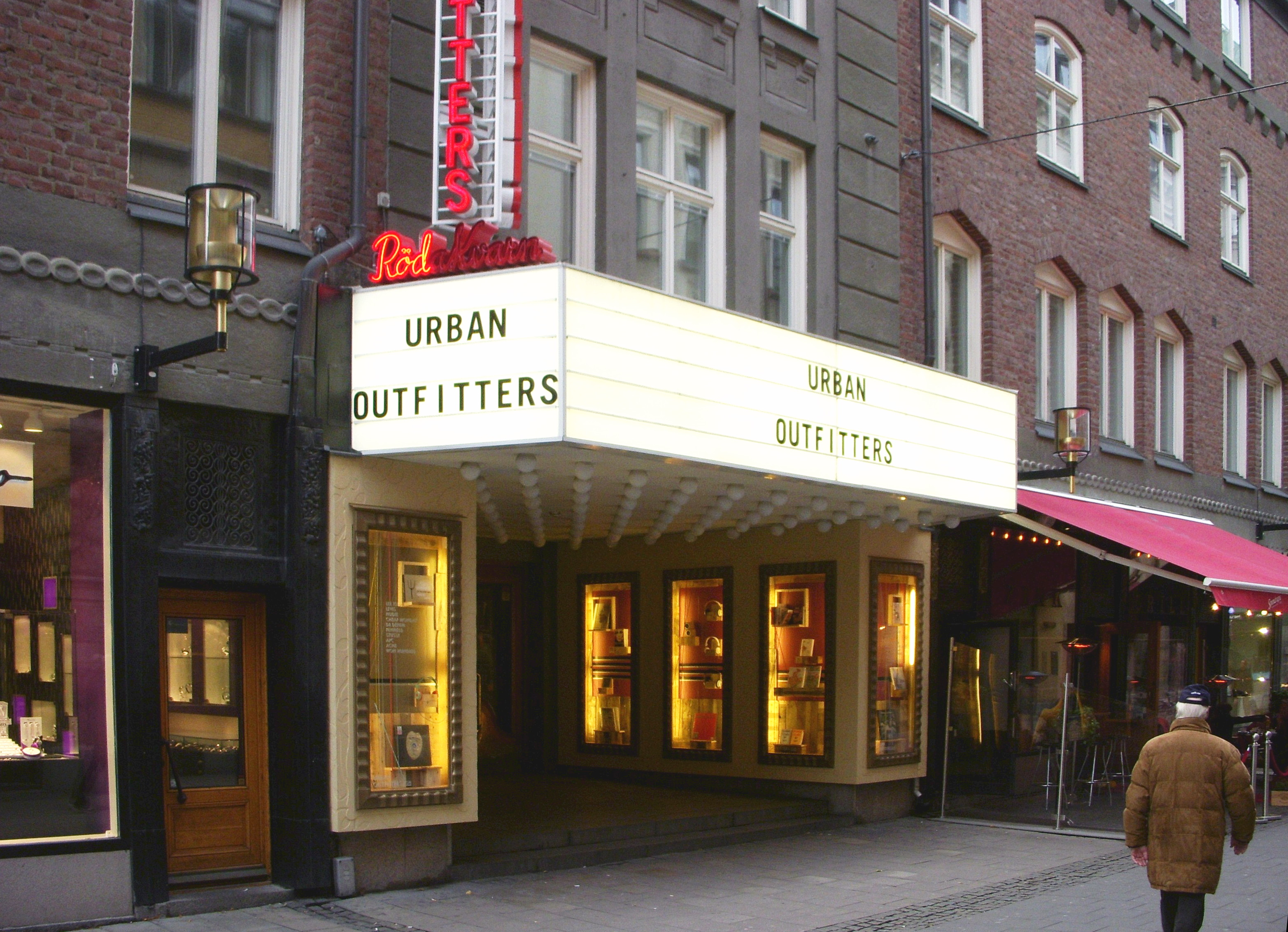 Röda Kvarn i Stockholm